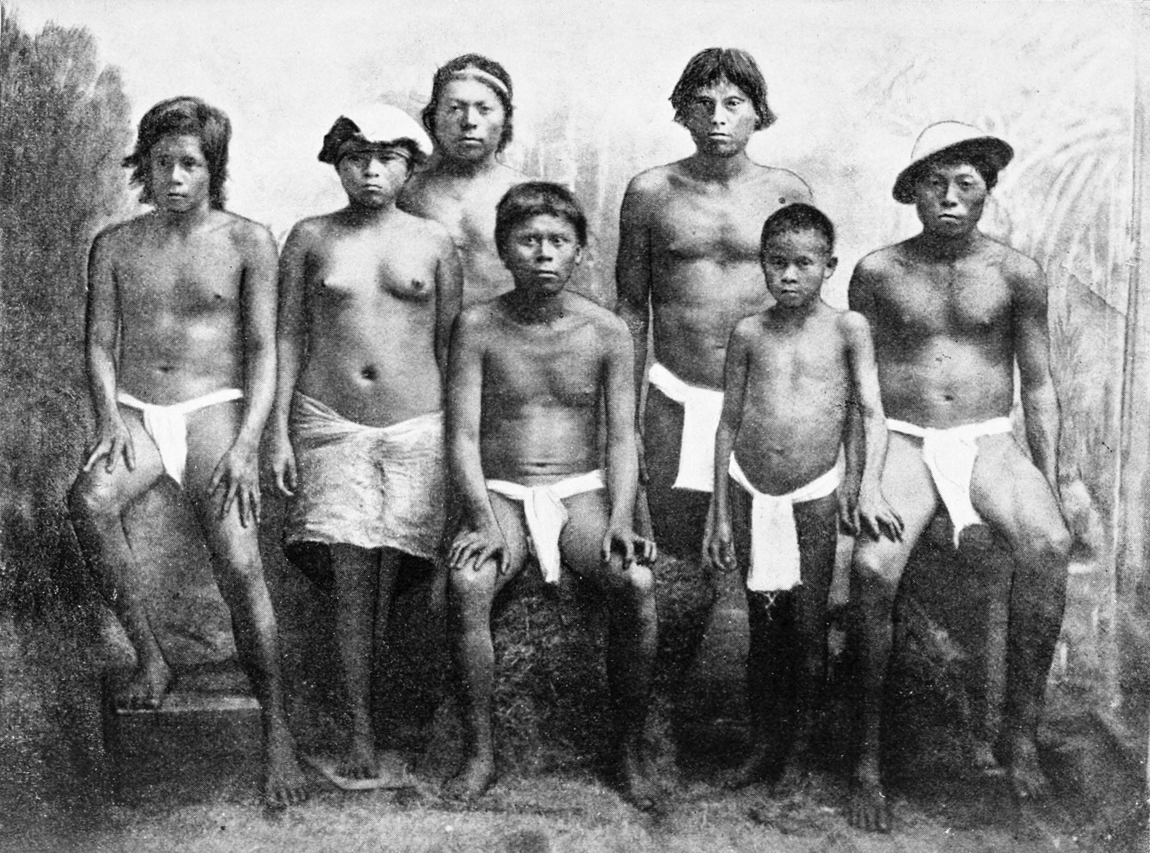 Mosquito (Miskito) Indians